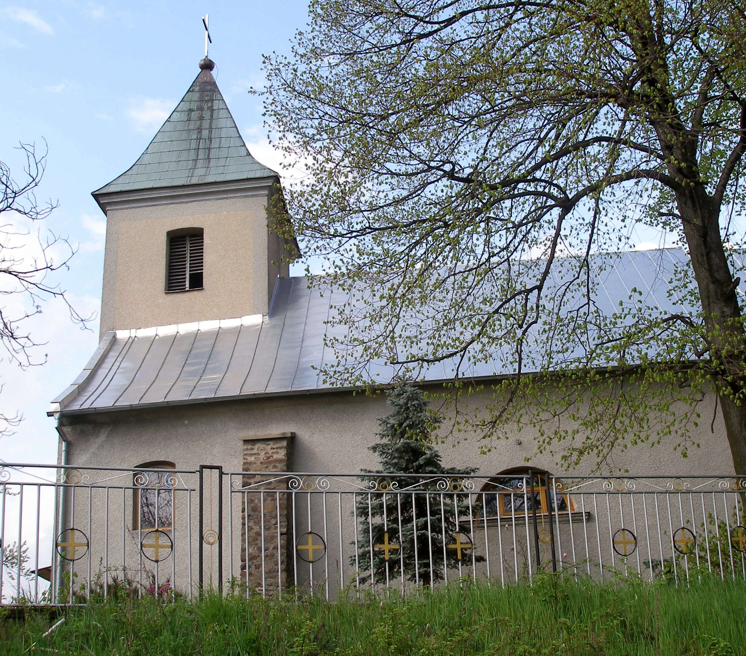 Obec Červenica okres Prešov región Šariš